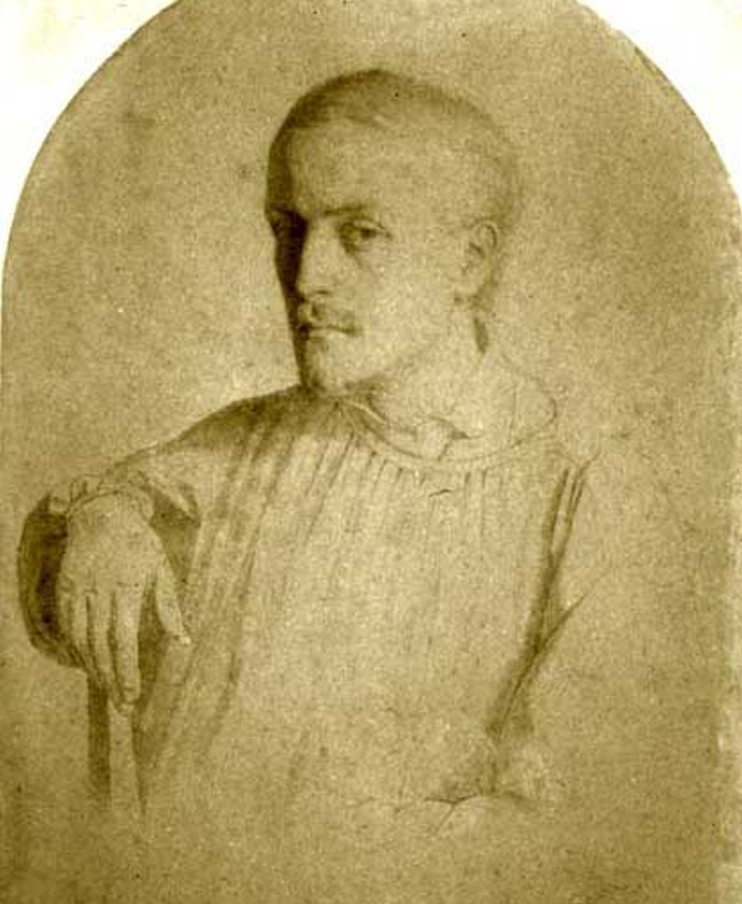 Alexandre Manceau (1817–1865) Alternative names Alexandre Manceau; Alexandre-Damien ManceauDescriptionFrench engraver and playwrightDate of birth/death 3 May 1817 21 August 1865Location of birth/death Trappes PalaiseauWork location FranceAuthority control : Q2833845 VIAF: 34497327 ISNI: 0000 0000 8076 8968 LCCN: n85012940 GND: 128443456 SUDOC: 030195802 WorldCat creator QS:P170,Q2833845 Le graveur et auteur dramatique est vêtu de sa blouse d'artiste. Il est le compagnon de la romancière George Sand.